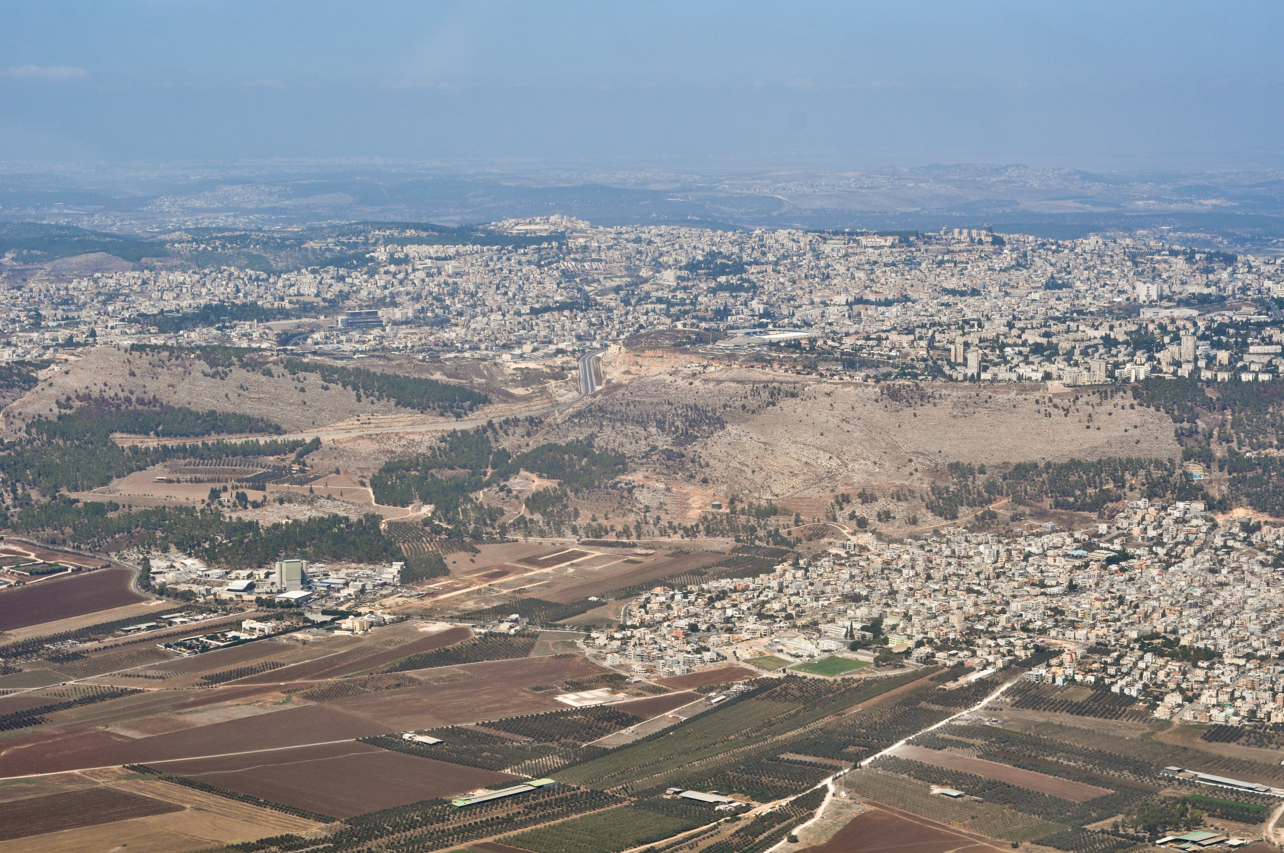 איכסאל ונצרת